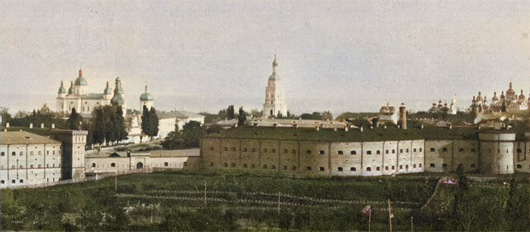 На передньому плані: Арсенал, Микільська брама (зліва). На задньому: Великий і малий Микільські собори із дзвіницею і Лавра (справа)